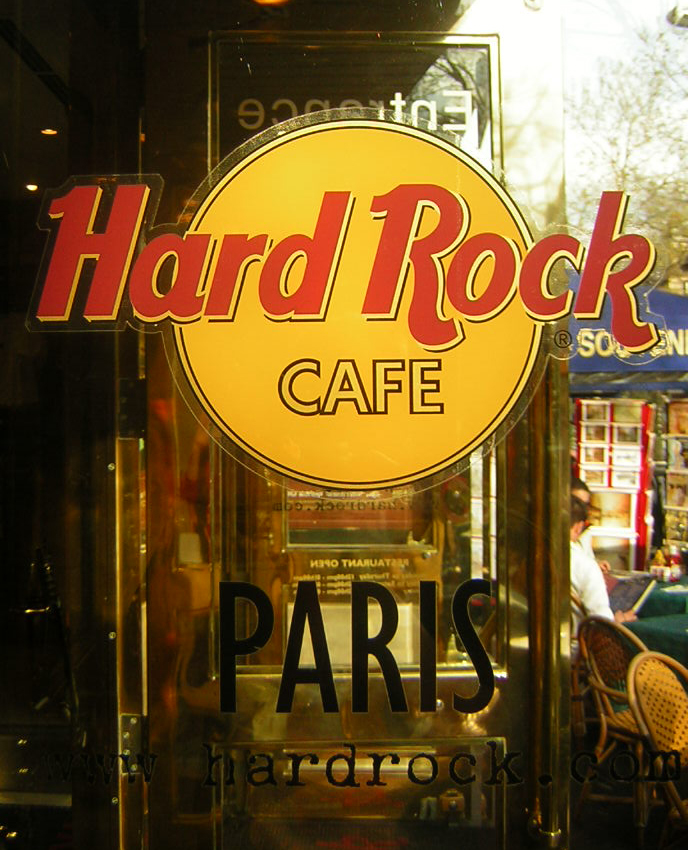 Logotipo del Hard Rock Café en París